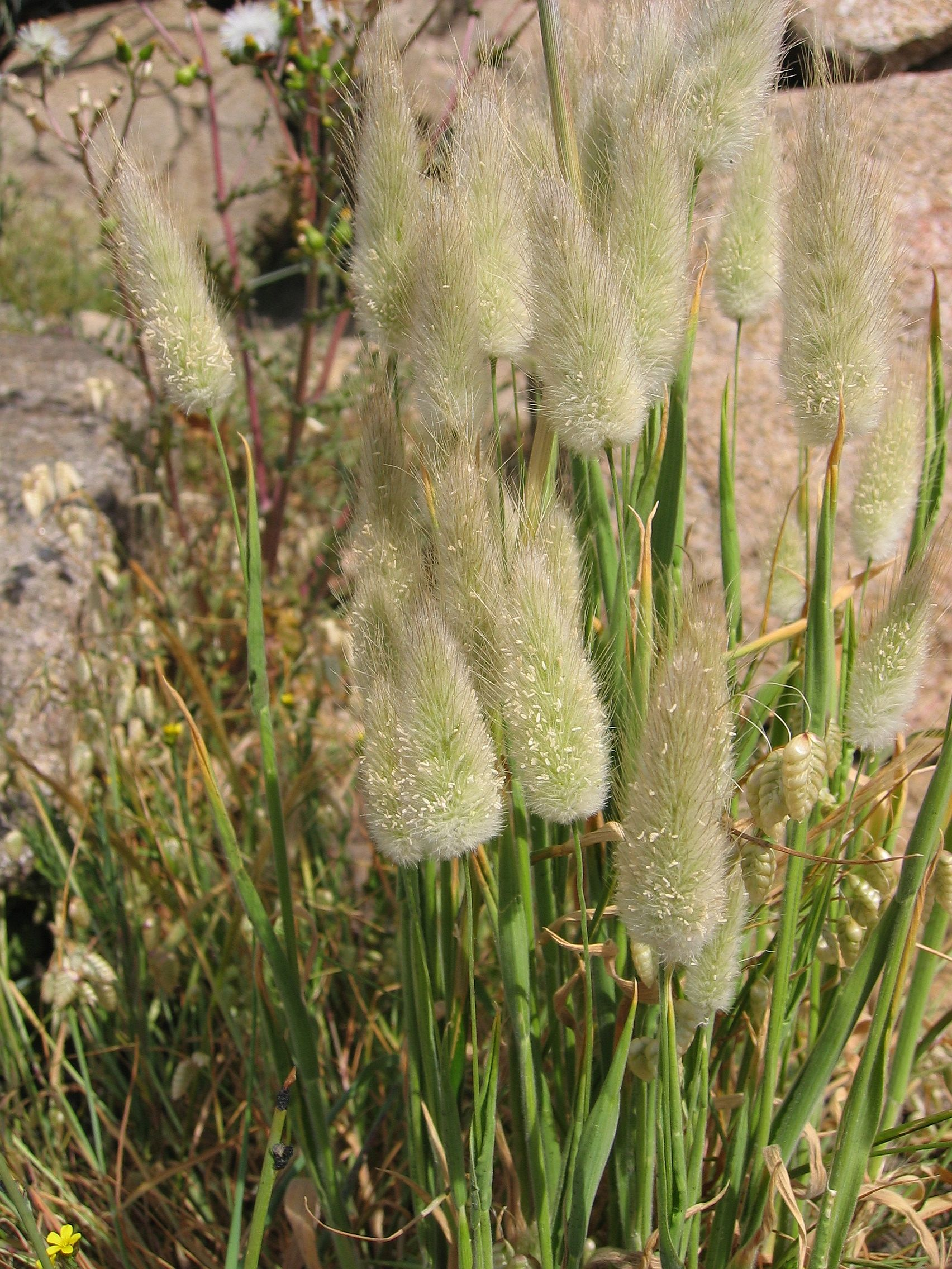 Lagurus ovatus Calvi, Corse, France